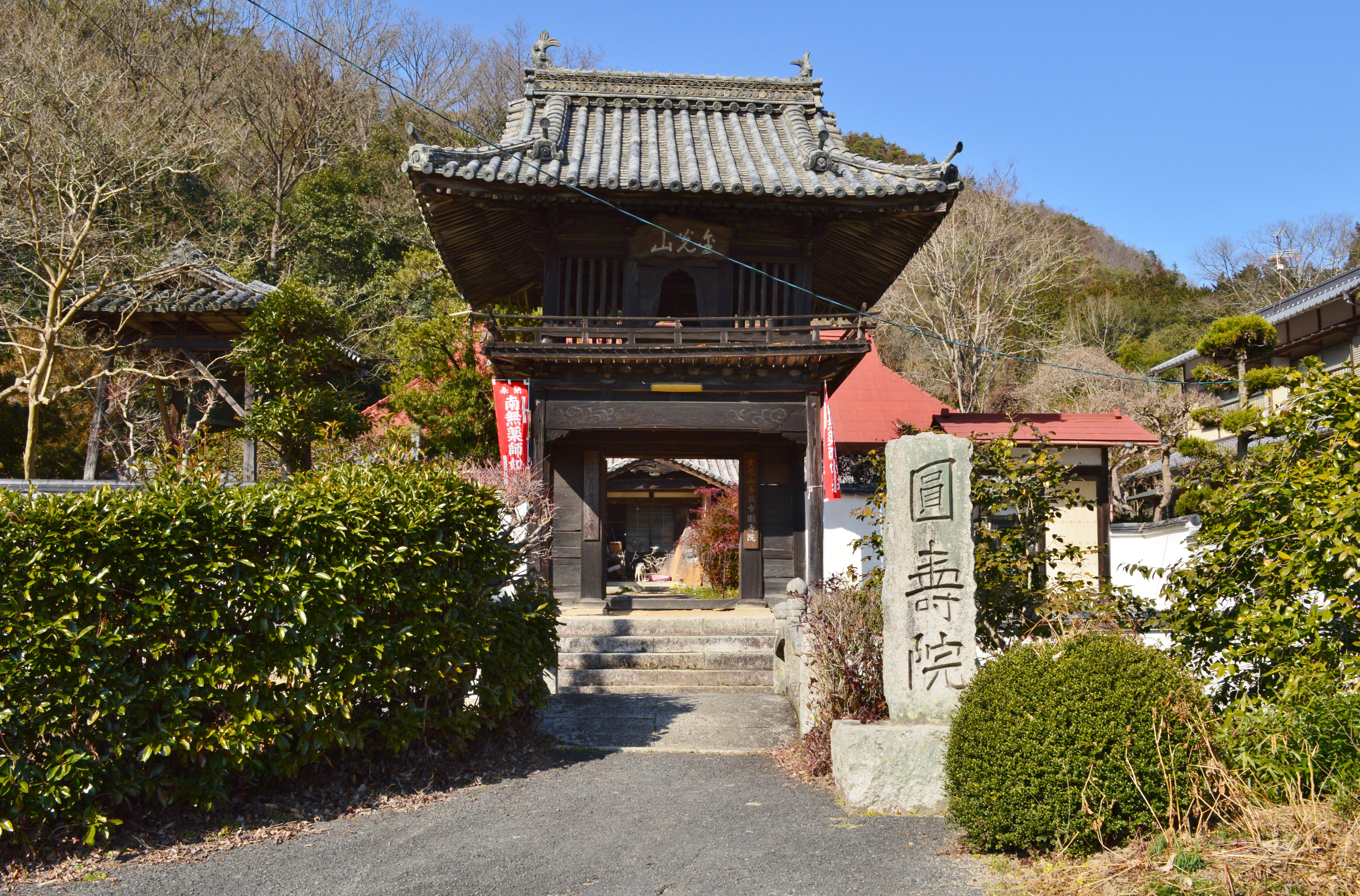 円寿院 (赤磐市) 山門